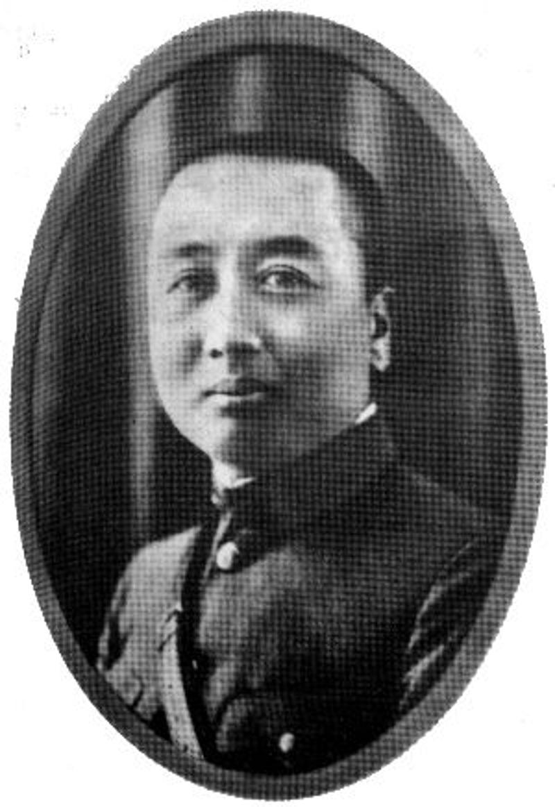 奉天閥時代の蘇炳文。